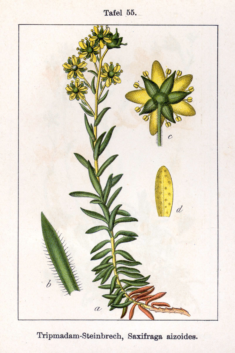 Saxifraga aizoides L. Original Description Tripmadam-Steinbrech, Saxifraga aizoides